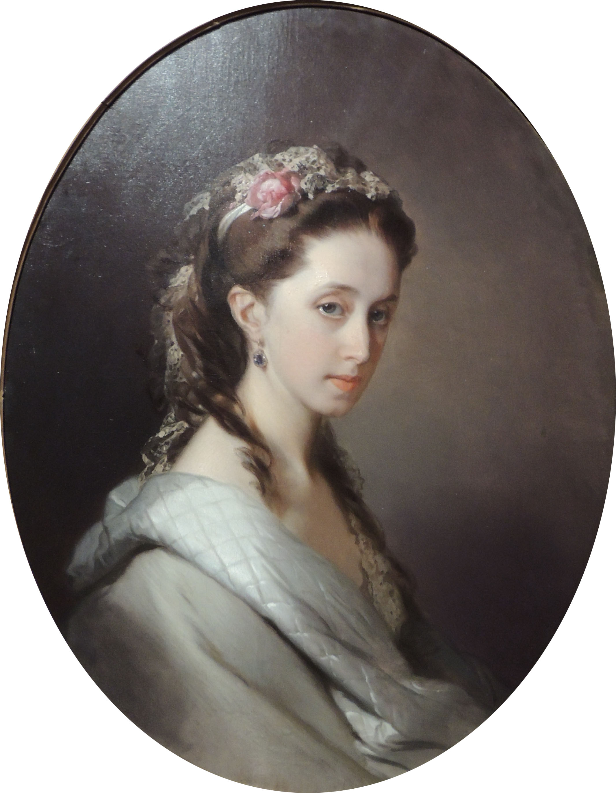 Портрет Е.А. Трегубовой. 1869. ГИМ. Евдокия Алексеевна Трегубова (1847-1881), дочь московского вице-губернатора Алексея Александровича Тимашева-Беринга от брака с Варварой Николаевной Волковой. Жена офицера кавалергардского полка Алексея Яковлевича Трегубова (1839-1890)